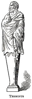 Terminus, il dio romano dei confini.